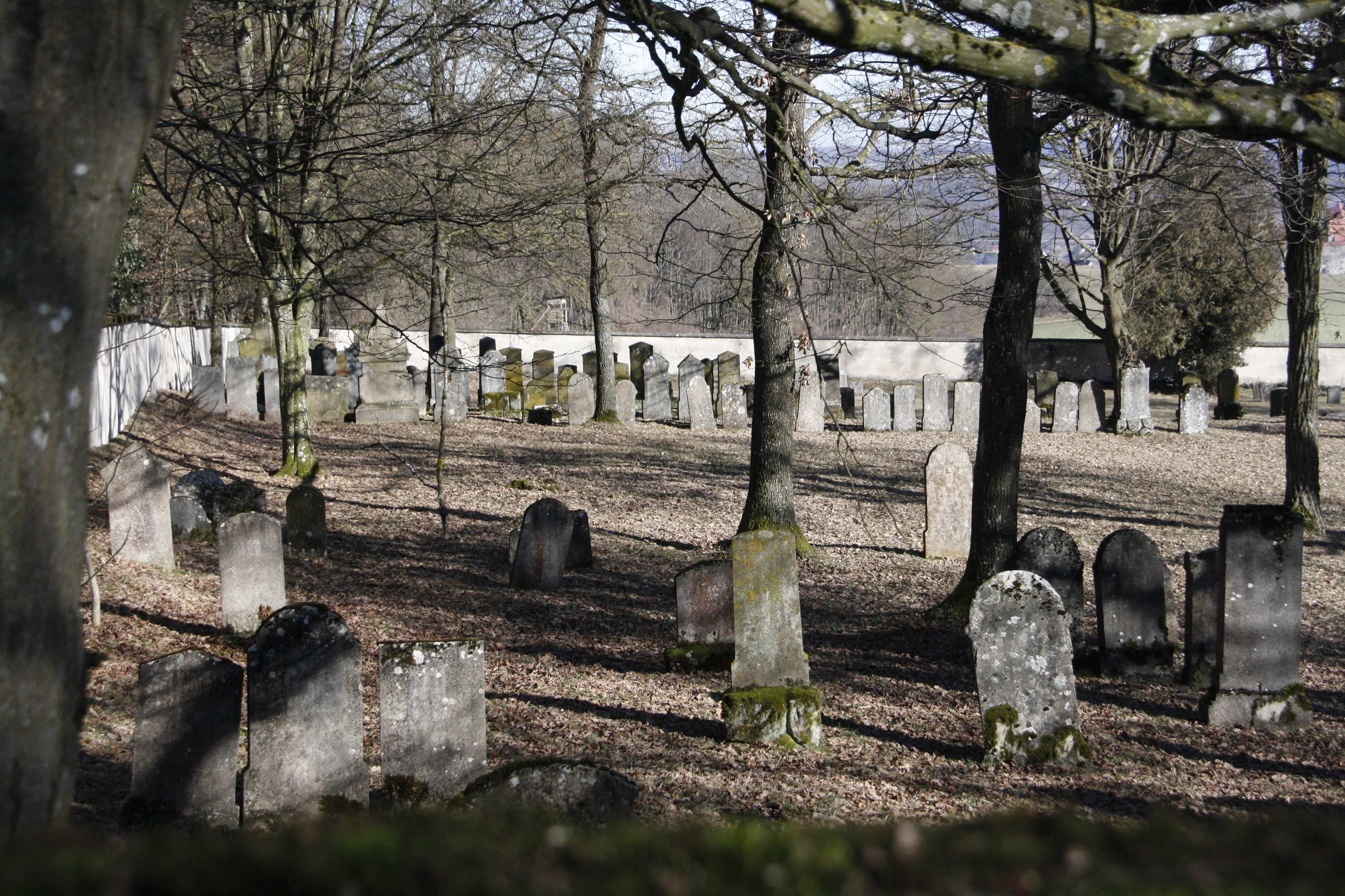 Friedhof ummauert, mit Grabsteinen des 18.-20.Jahrhundert; westlich des Ortes am Hühnerberg.This is a photograph of an architectural monument.